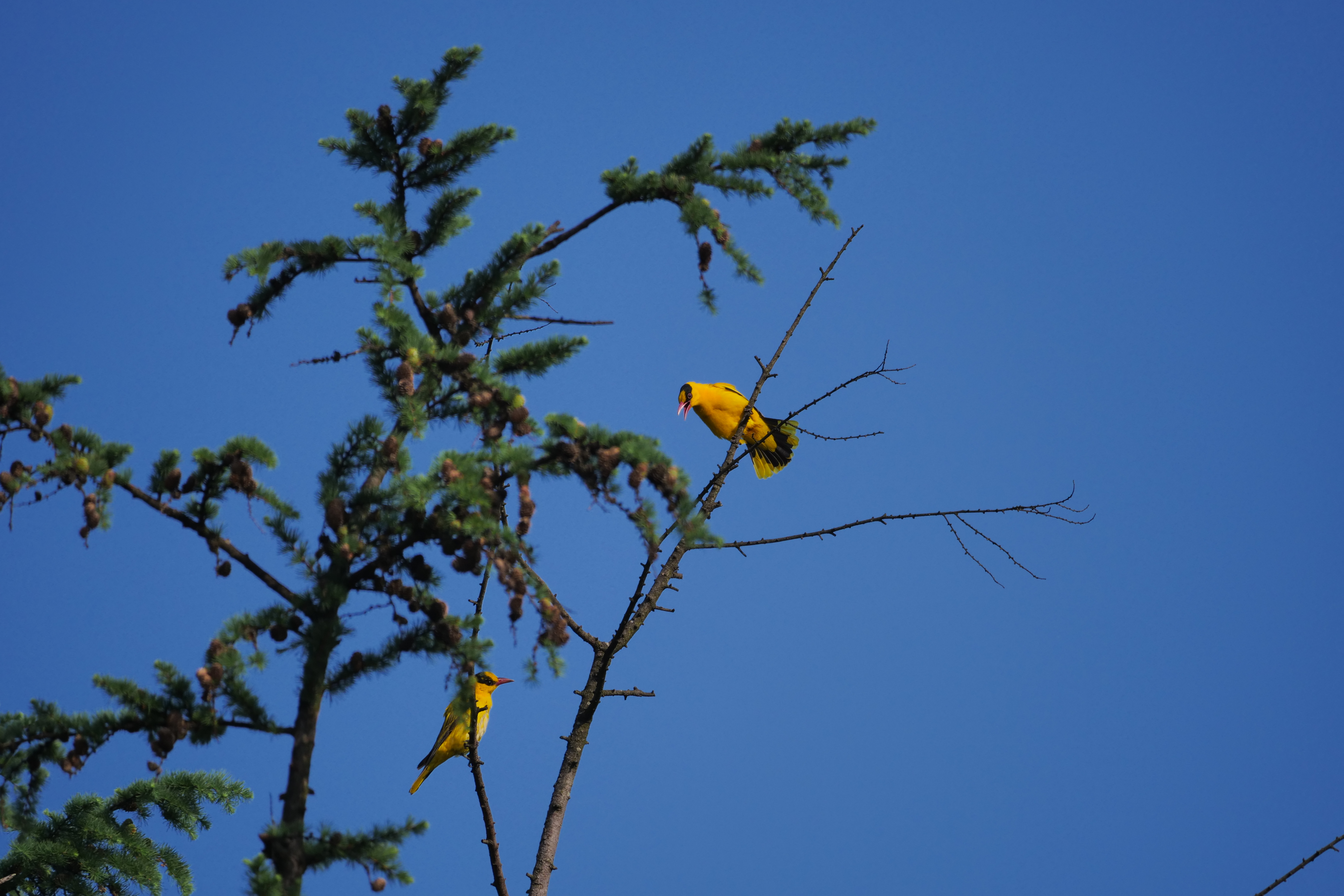 대한민국 경기도 광주시 초월읍 산이리 62번지 에서 촬영